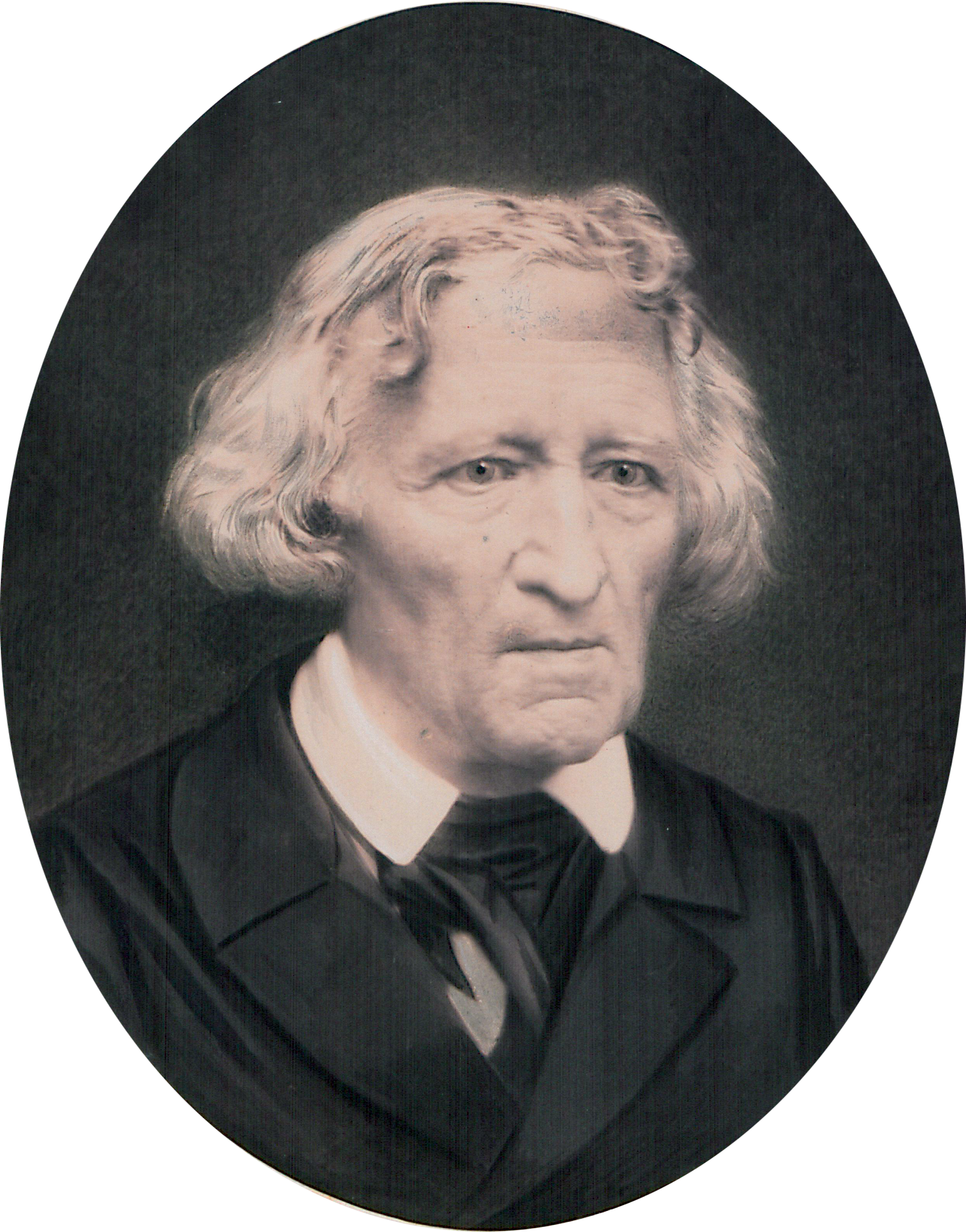 Photograph 19,8 x 16,2 cm. Hessisches Staatsarchiv Marburg.